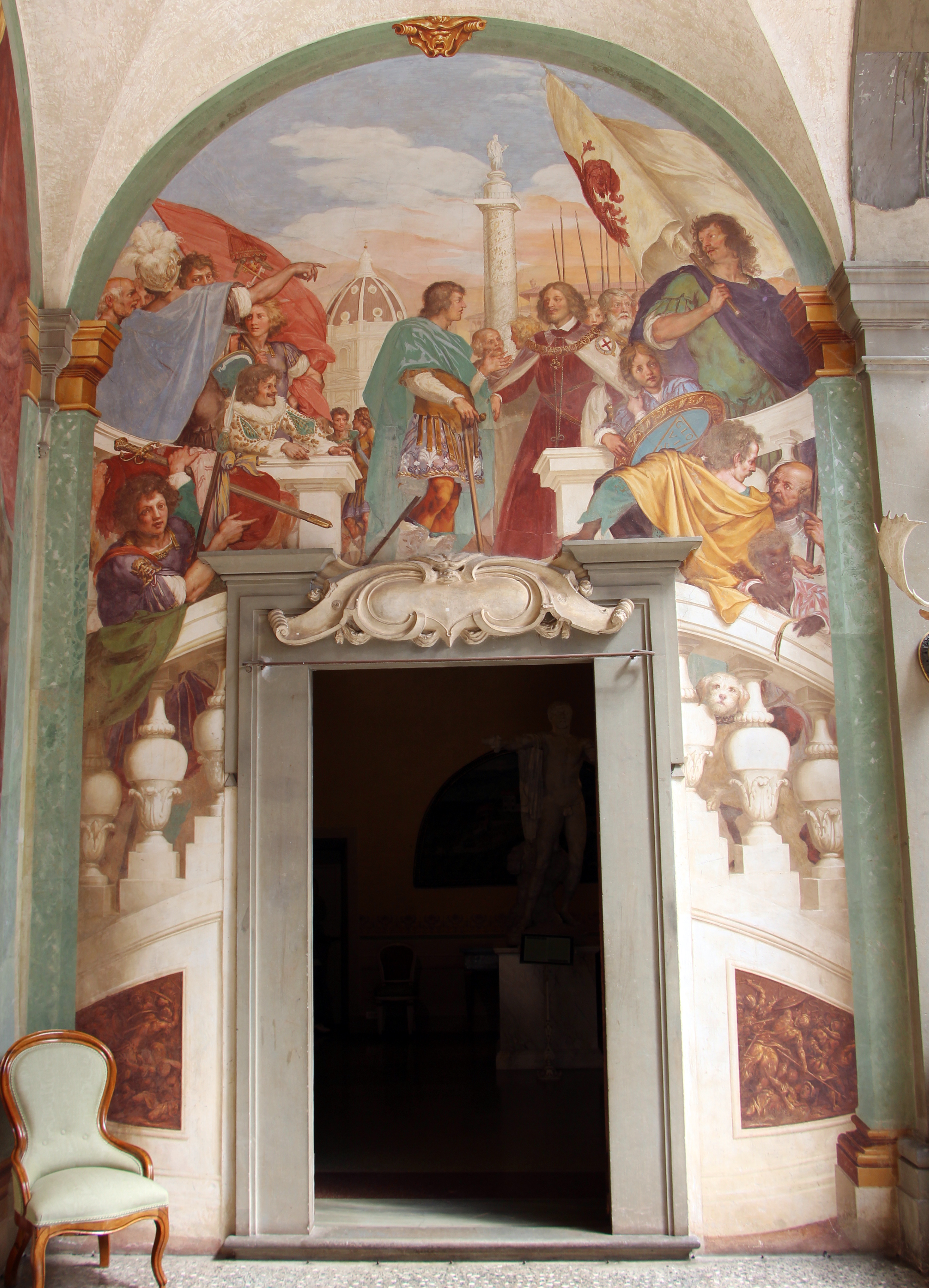 Villa medicea della Petraia - MIBAC The making of this document was supported by Wikimedia CH. (Submit your project!) For all the files concerned, please see the category Supported by Wikimedia CH. This is a photo of a monument which is part of cultural heritage of Italy.